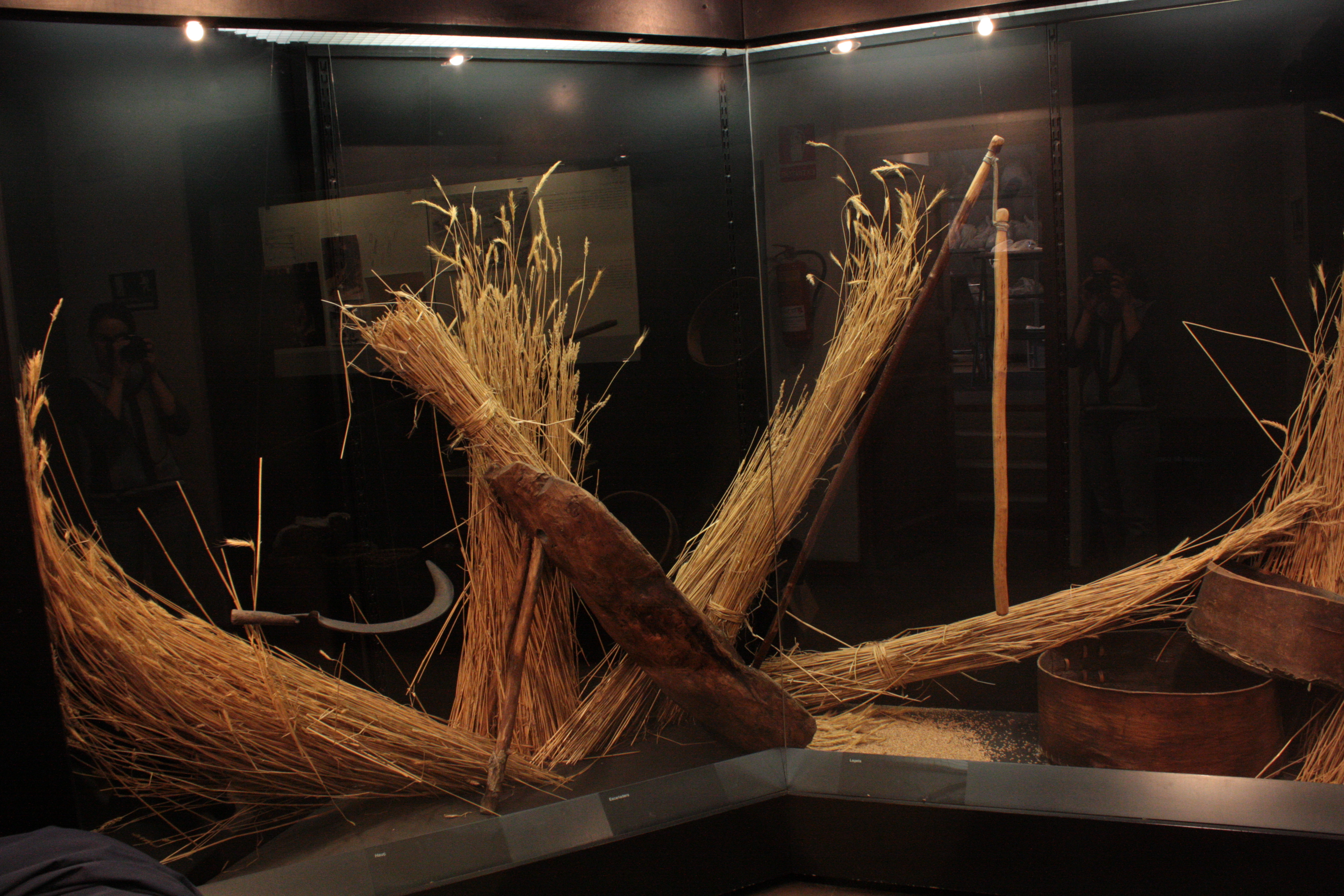 Imatges del segon projecte museogràfic del Musèu dera Val d'Aran de Vielha. Dit projecte va ser realitzat sota la direcció de Jusèp Boya e Busquets al 2006. Fotografia realitzada per la tècnica del museu Mònica Rodríguez.